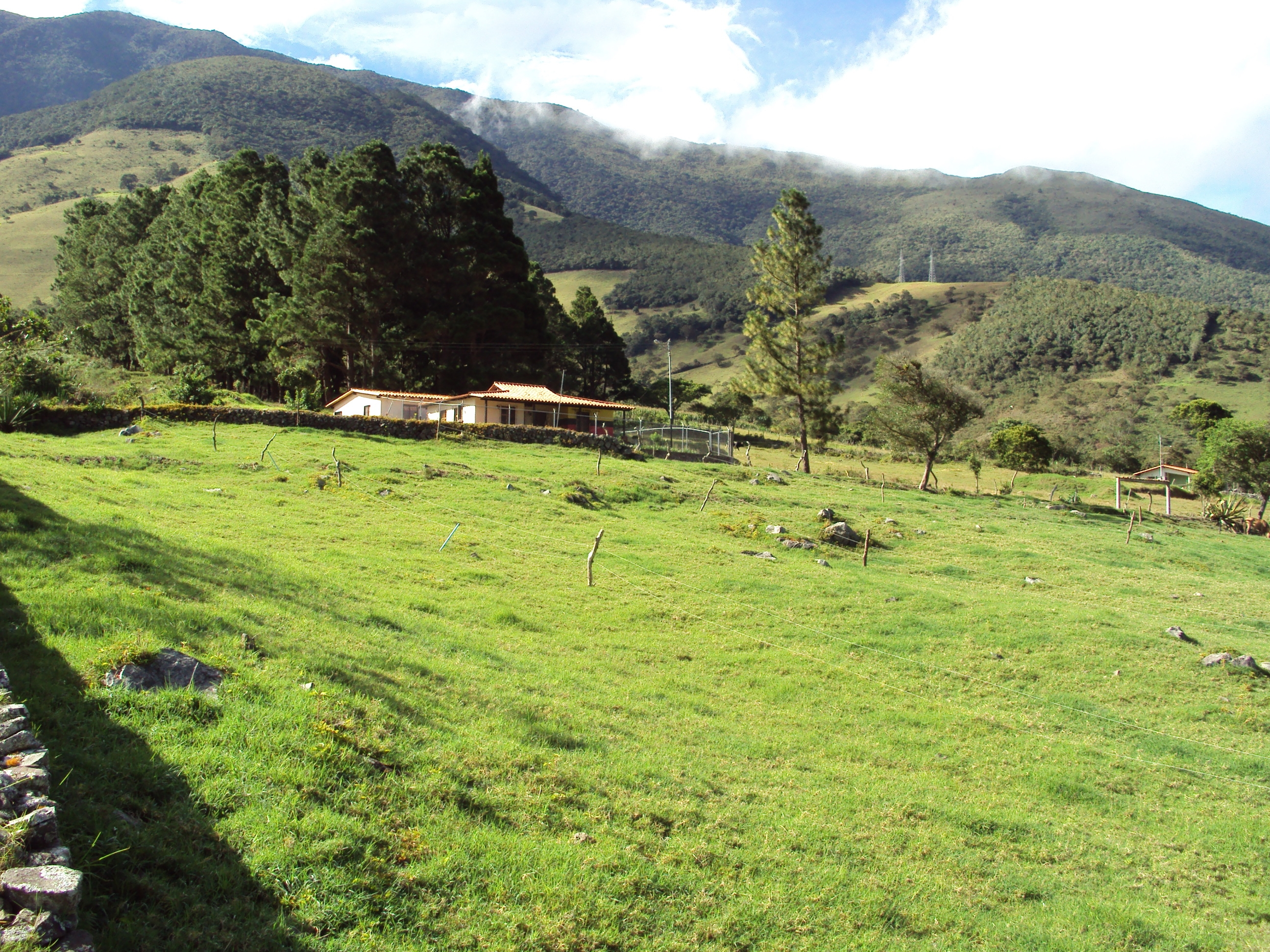 Tachira